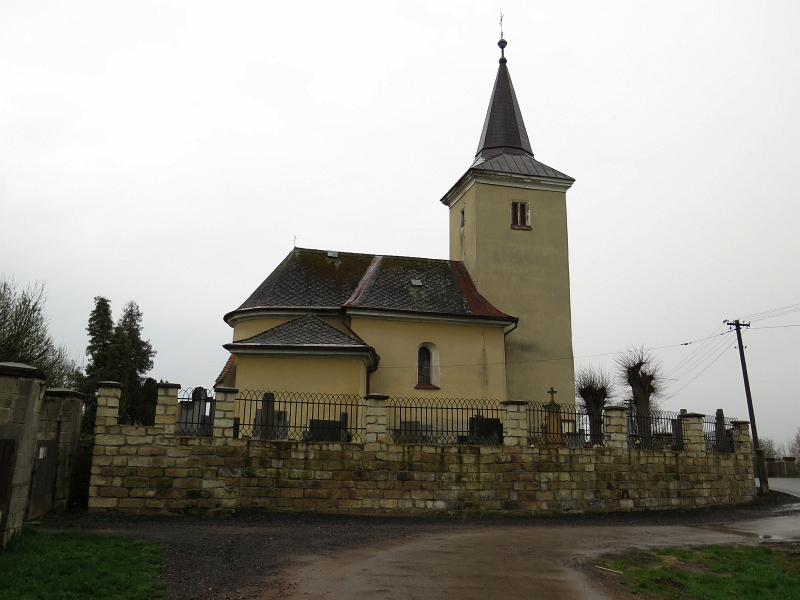 Kostel Nalezení svatého Kříže, uprostřed obce, st. 31, Zliv (Libáň).